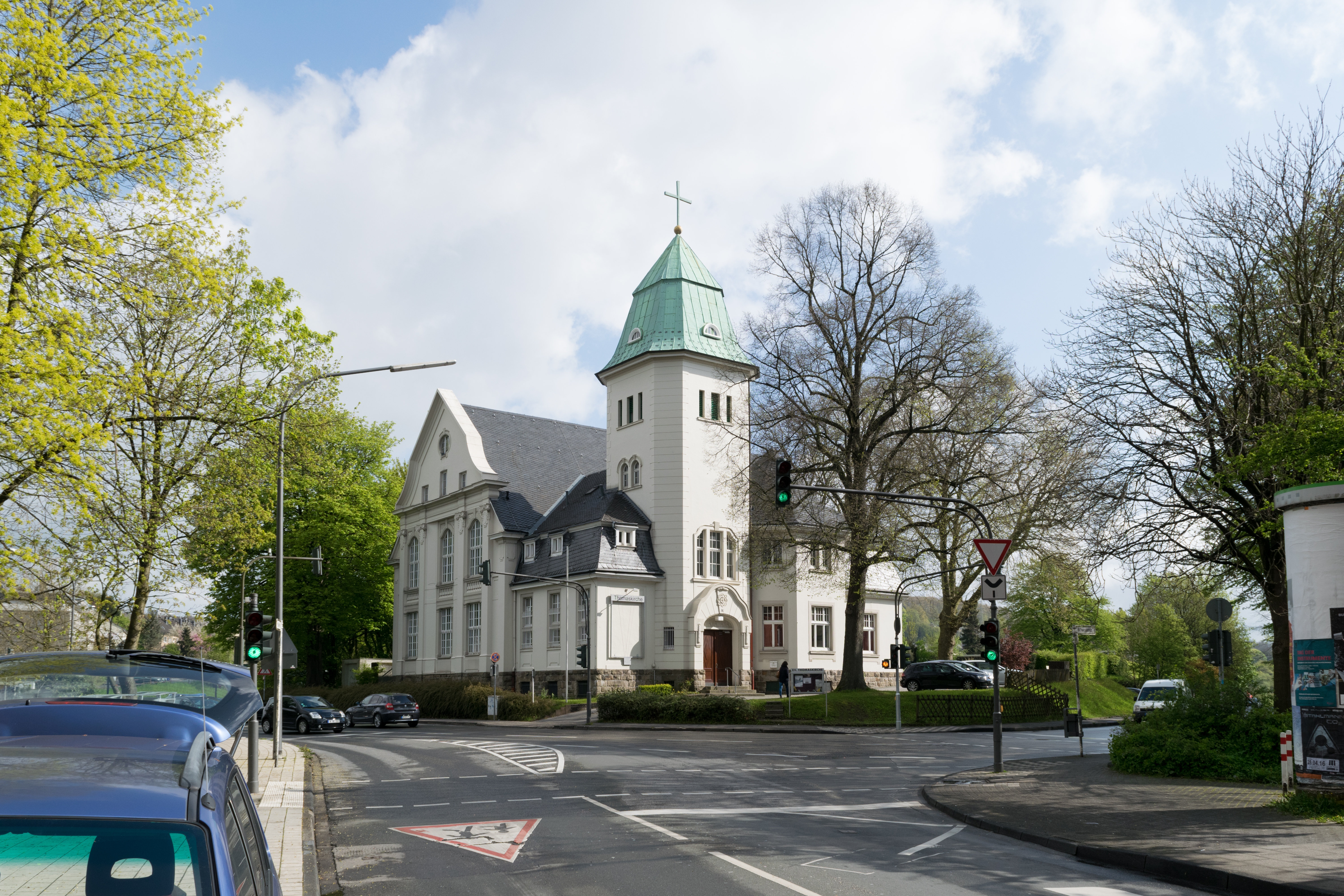 Opphofer Straße, Wuppertal